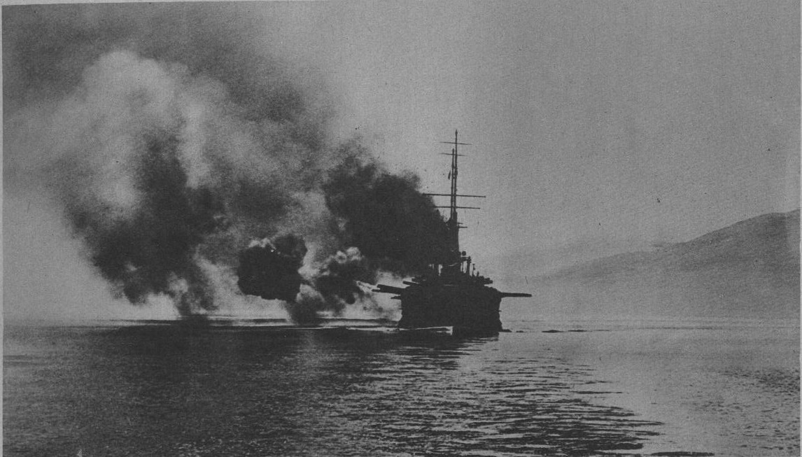 Le cuirassé français le Mirabeau bombarde Athénes le 1er décembre (18 novembre julien) 1916.